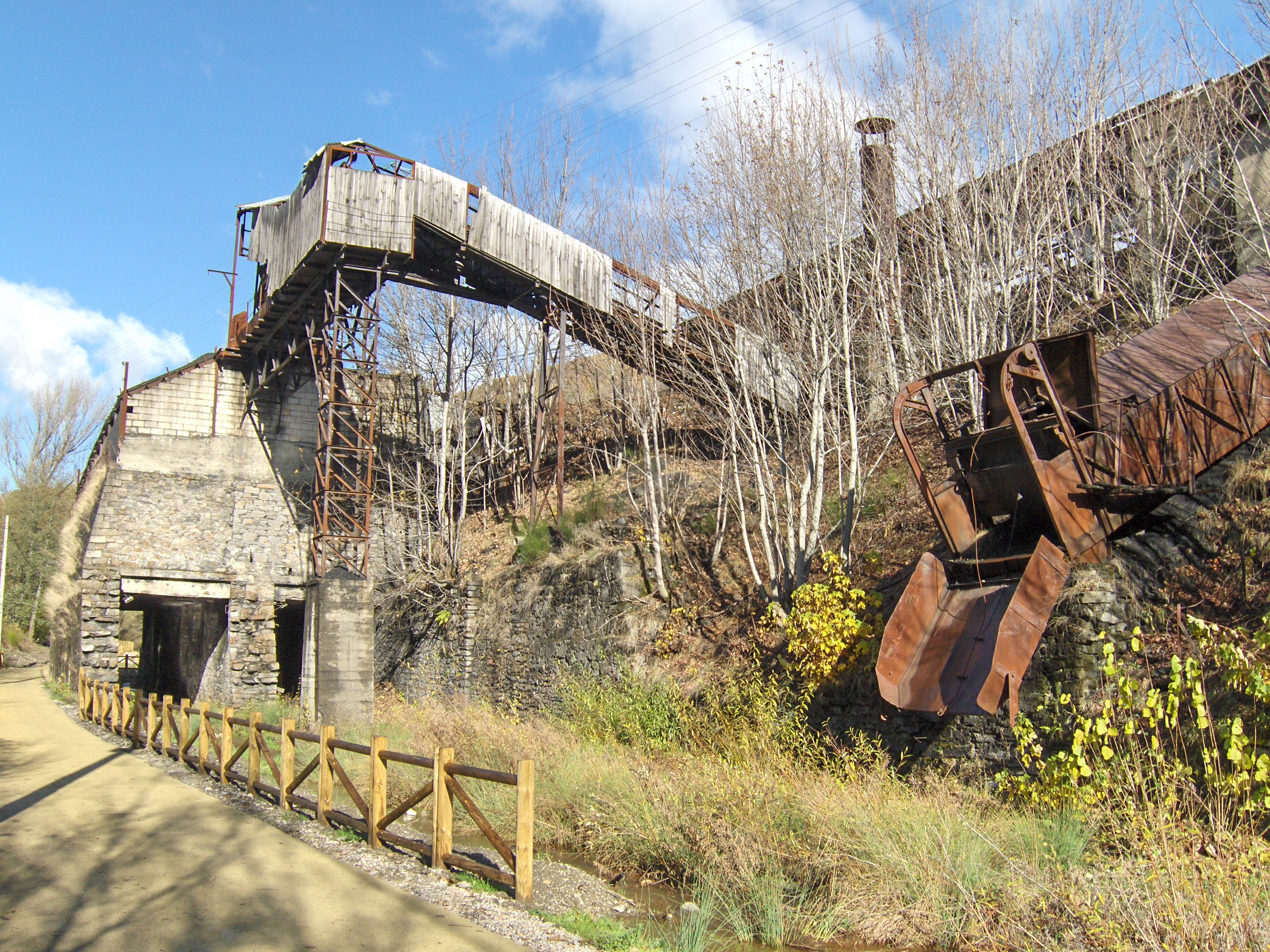 Instalación minera en desuso, Villager de Laciana (León)